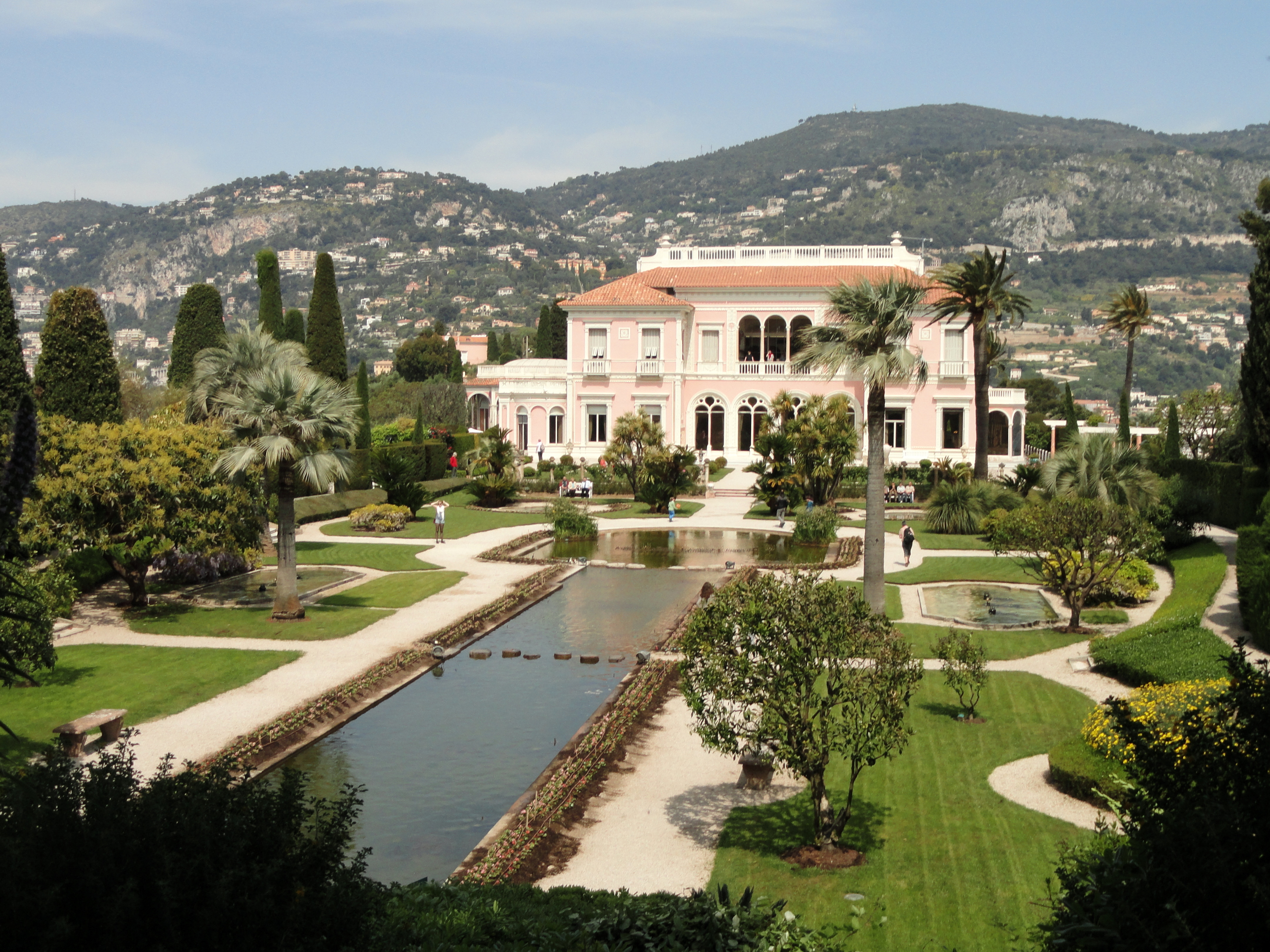 Villa Ephrussi de Rothschild, Saint-Jean-Cap-Ferrat, France.